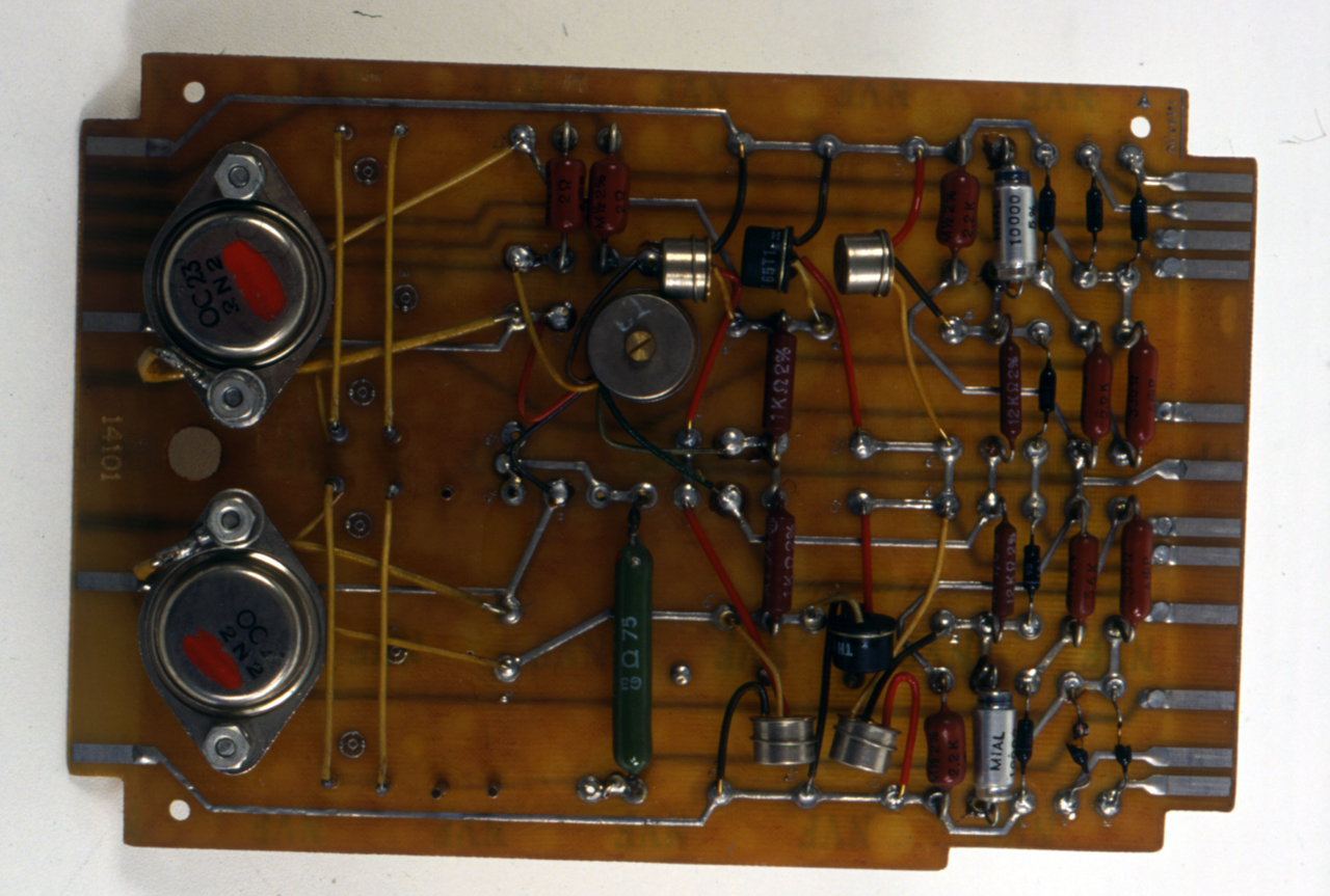 L'oggetto è costitutito da una piastra di bachelite sulla quale è presente un circuito stampato a doppio strato Su di essa sono installati componenti elettronici quali resistori, diodi, condensatori, transistor e nuclei di ferrite Il circuito stampato termina sui due lati corti della scheda sagomati per l'alloggiamento nei connettori di collegamento alle altre parti del sistema. Modalità d'uso L'utilizzo avviene all'interno del Sistema Olivetti ELEA 9009 per la gestione della memoria. Notizie storico-critiche A partire dal 1956 il Laboratorio Ricerche Elettroniche Olivetti, progetta un calcolatore (di grandi dimensioni per l'epoca) prima in una versione a valvole, poi in una seconda versione a transistor, che prende il nome di Elea 9003. (Elaboratore Elettronico Aritmetico)Questo calcolatore, una delle prime macchine non prototipali completamente transistorizzate realizzate al mondo, è prodotto a partire dal 1959 in alcune decine di esemplari e installato presso importanti aziende in Italia L'Elea 9003 è dotato di una memoria a nuclei di ferrite, con memorie di massa a nastro magnetico. Il supporto a nastro magnetico può anche essere utilizzato per l'input dei dati previa una conversione fuori linea da schede perforate o da nastro perforato L'Elea 9009 venne prodotto nello stesso anno del 9003 Successivamente Olivetti realizza l'Elea 6001, pensato per le applicazioni di calcolo scientifico, ma poi utilizzato come elaboratore gestionale, commercializzato a partire dal 1962 e installato in numerosi esemplari L'Elea 6001 è anch'esso completamente transistorizzato e dotato di una memoria a nuclei di ferrite indirizzabile al singolo carattere. La memoria di massa è ancora a nastro magnetico. L'input per le applicazioni scientifiche è usualmente il nastro perforato, mentre per le applicazioni gestionali si utilizza un lettore di schede.